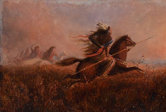 "Indians on the Prairie", Gemälde von Charles Wimar, signiert und datiert 1860